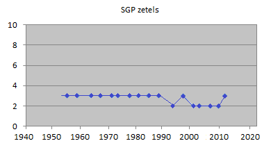 SGP zetelverloop 1956-2012